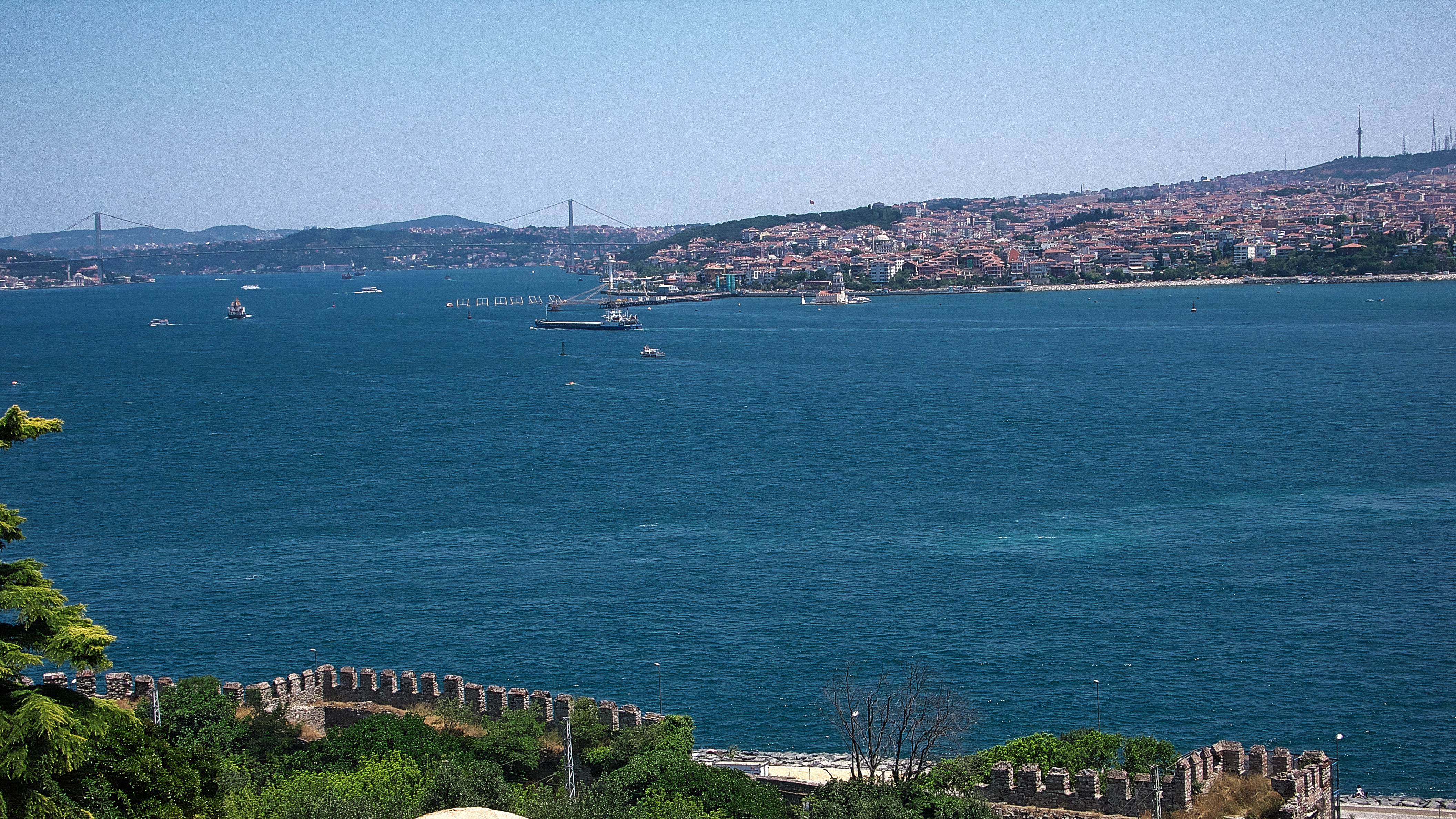 Vista del Bósforo desde el Palacio de Topkapi